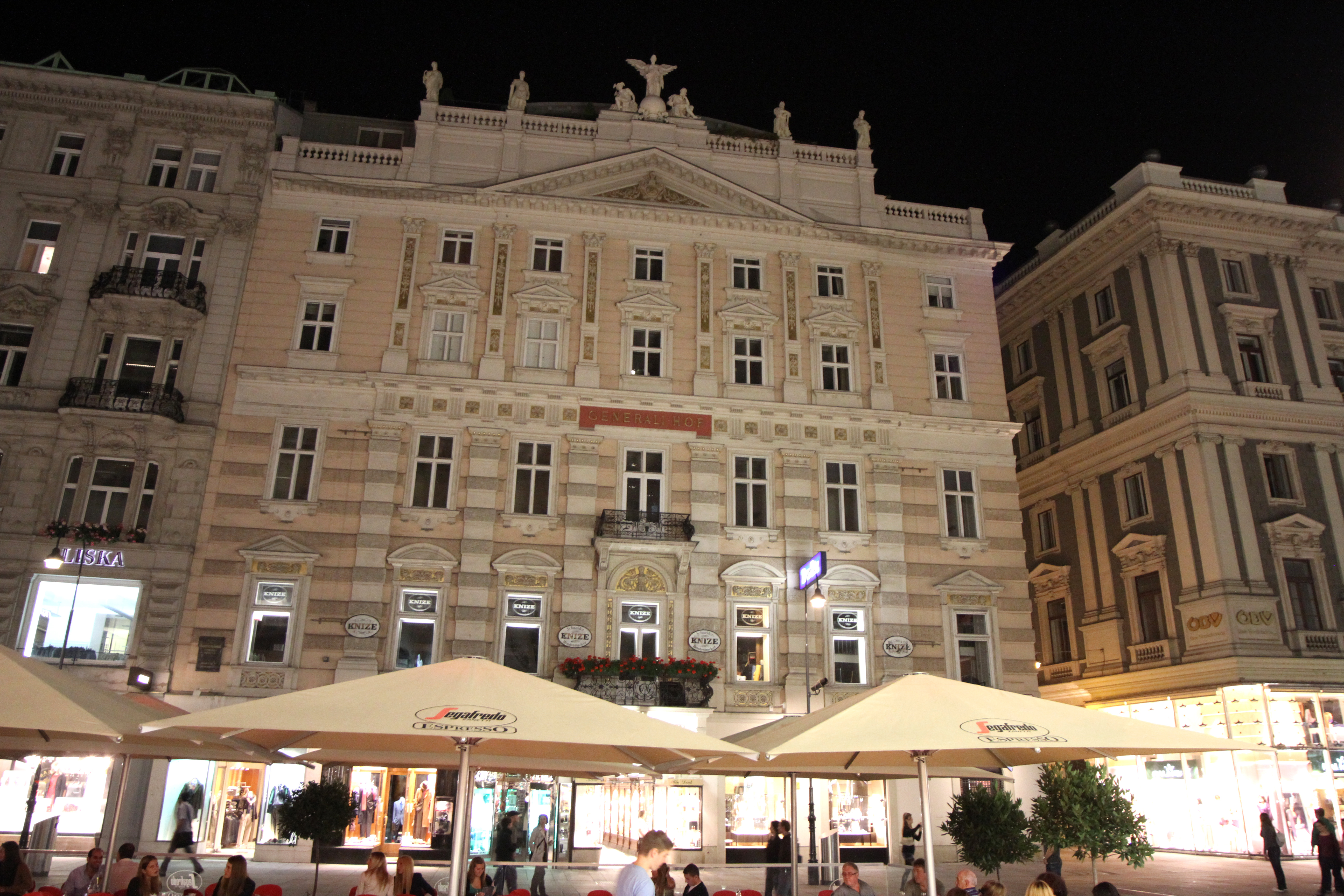 Generalihof samt dem Geschäftslokal Knize